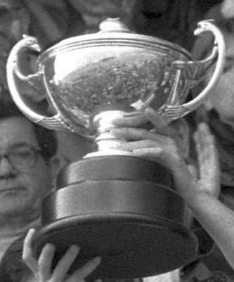 La Coupe de France de rugby, version 1985 (cropped)..